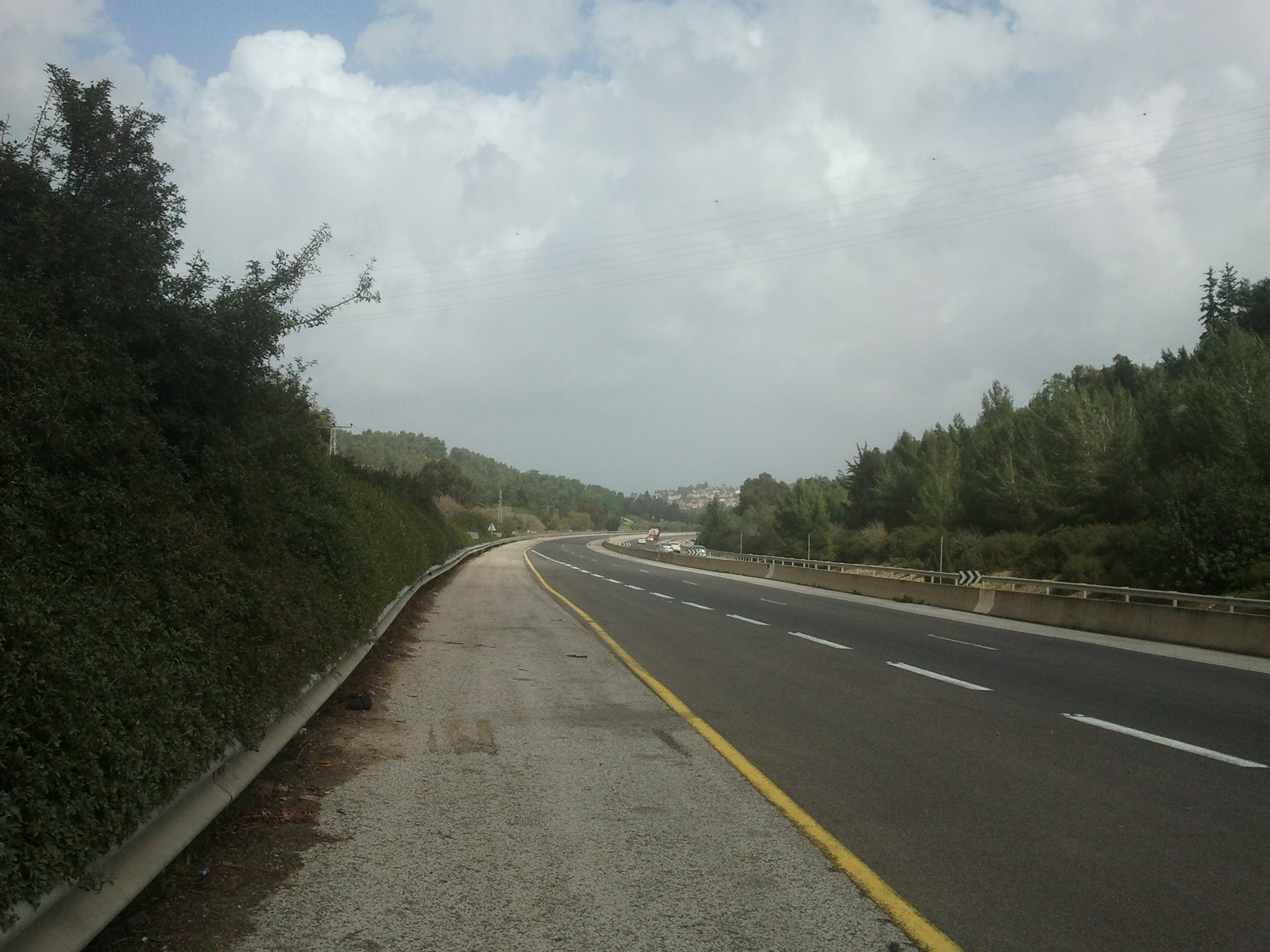 נחל יקנעם מהווה גבול גאוגרפי בין הר הכרמל ורמות מנשה. בעמק הנחל עובר כביש 70. מבט לכיוון צפון